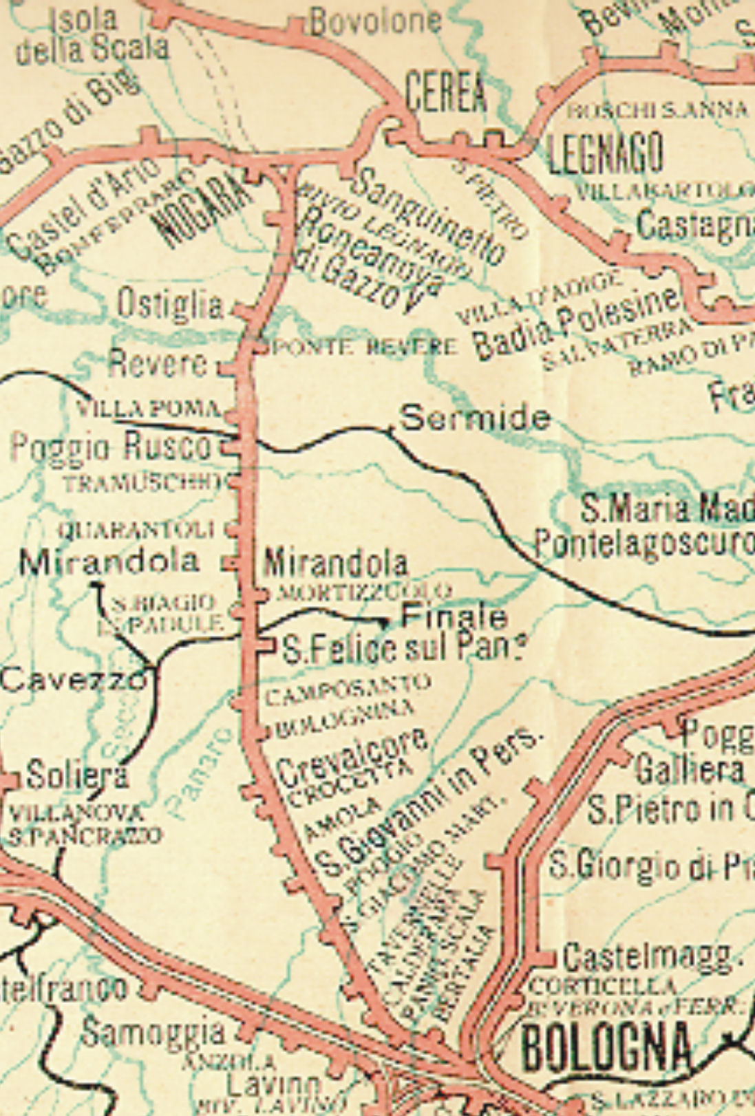 Dettaglio -relativo alla linea ferroviaria Verona-Bologna- di una Carta che descrive il Compartimento di Bologna nel 1912 Restaurata da Horatius.